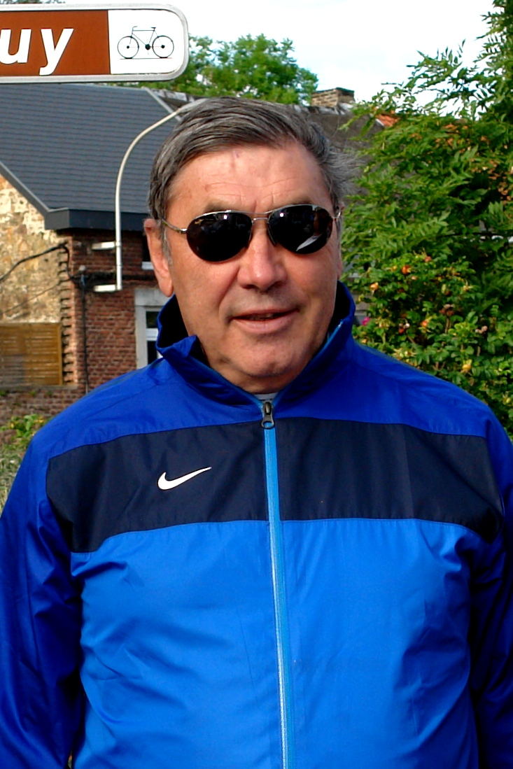 Eddy Merckx le 18 juin 2011 au gran fondo.